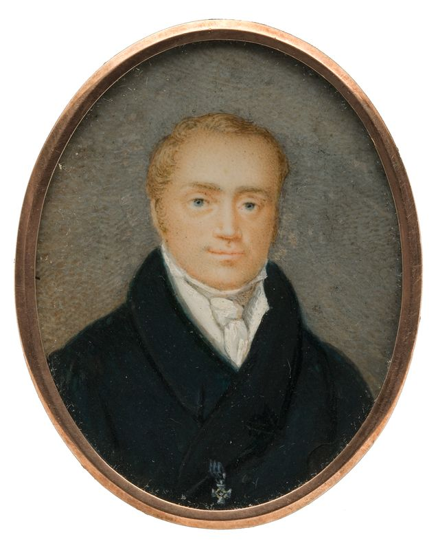 Jonas Joteika. Ksaveras Hornovskis. 1840 m. Lietuvos dailės muziejus. Eksponatas